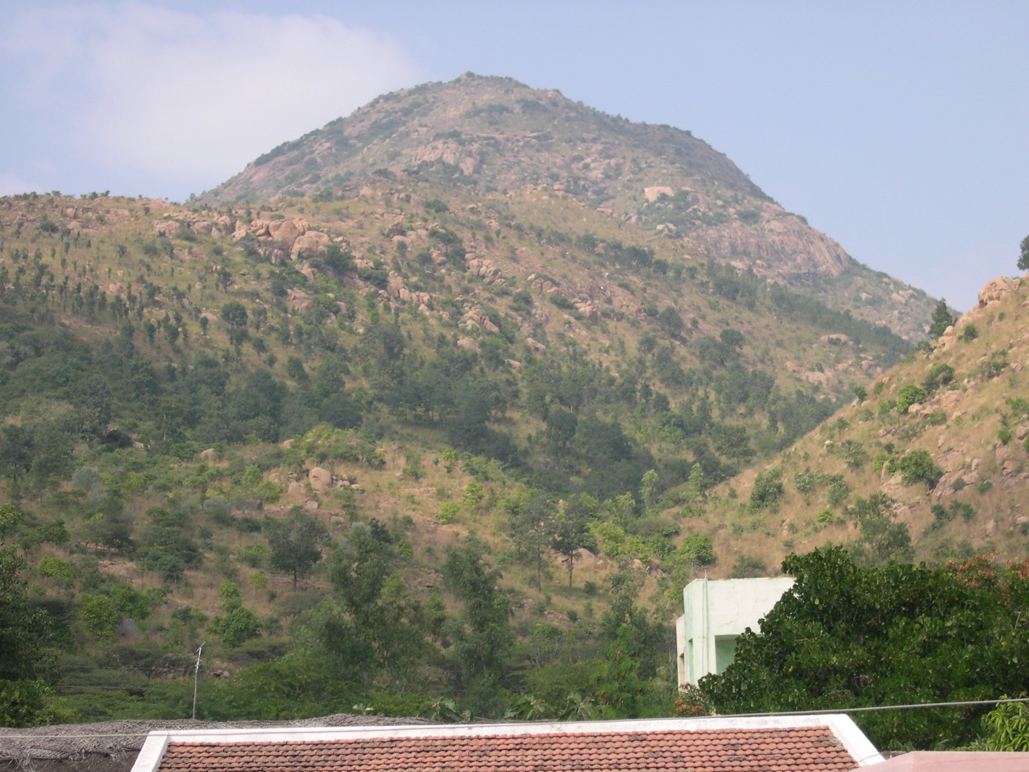 Arunachala Hill taken from base near Sri Ramanasramam